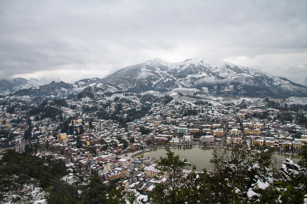 Thị trấn Sa Pa trong tuyết trắng